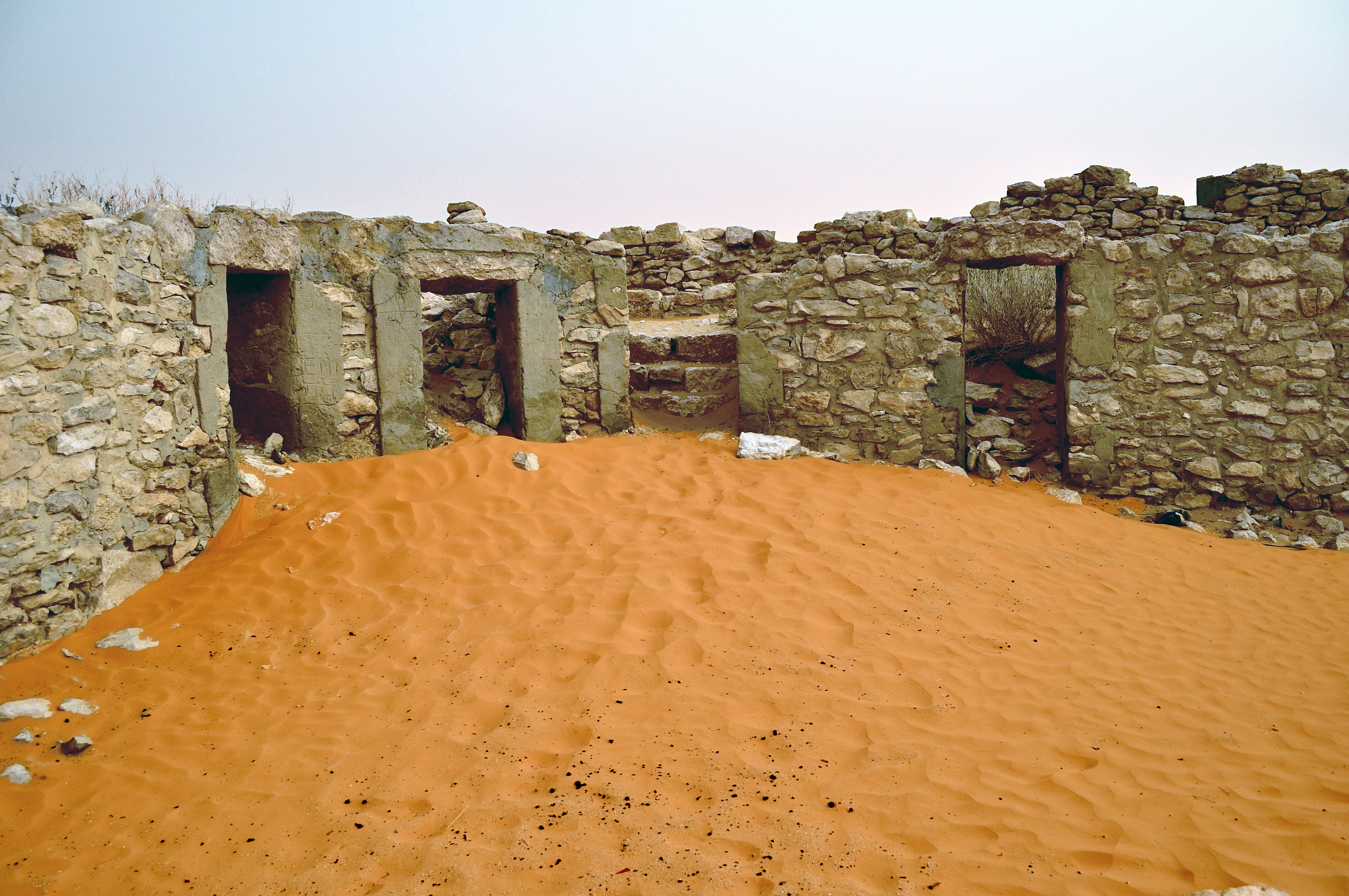 Kleinkastell Tisavar: Kastellecke im Bereich vor dem Stabsgebäude. In der Bildmitte ist ein Aufgang zum umlaufenden Wehrgang zu sehen. Der Rotstich im Originalbild wurde entfernt.